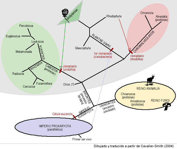 Árbol de la vida con énfasis en los clados que adquirieron cloroplastos de forma primaria (Plantae) o secundaria. Dibujado a partir de Cavalier-Smith (2004)